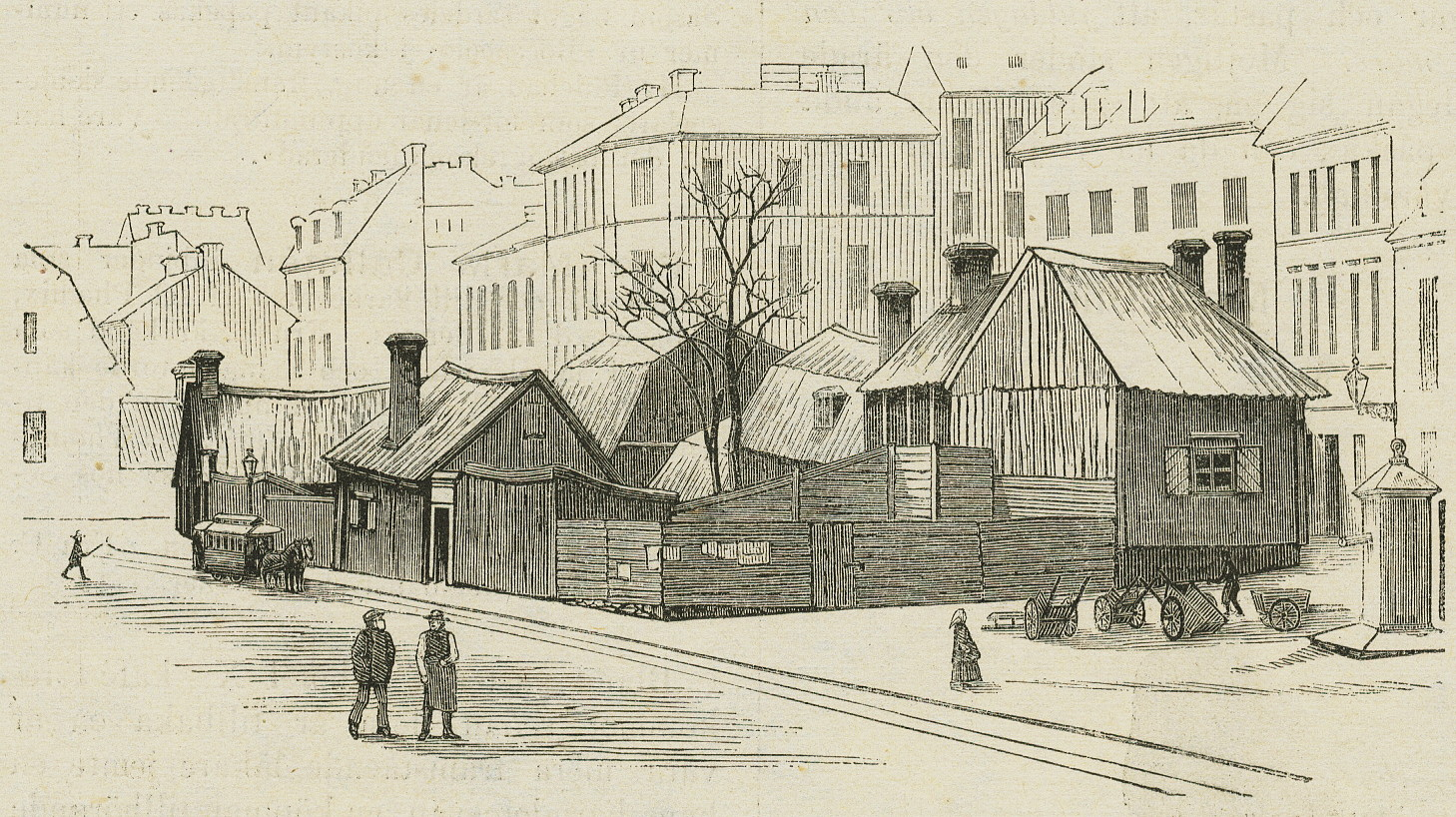 Bebyggelsen på det numera försvunna kvarteret Italien Mindre (hörnet nuv. Birger Jarlsgatan / Snickarbacken)